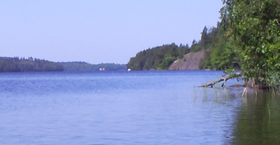 Lake Ärlången, Östergötland, Sweden